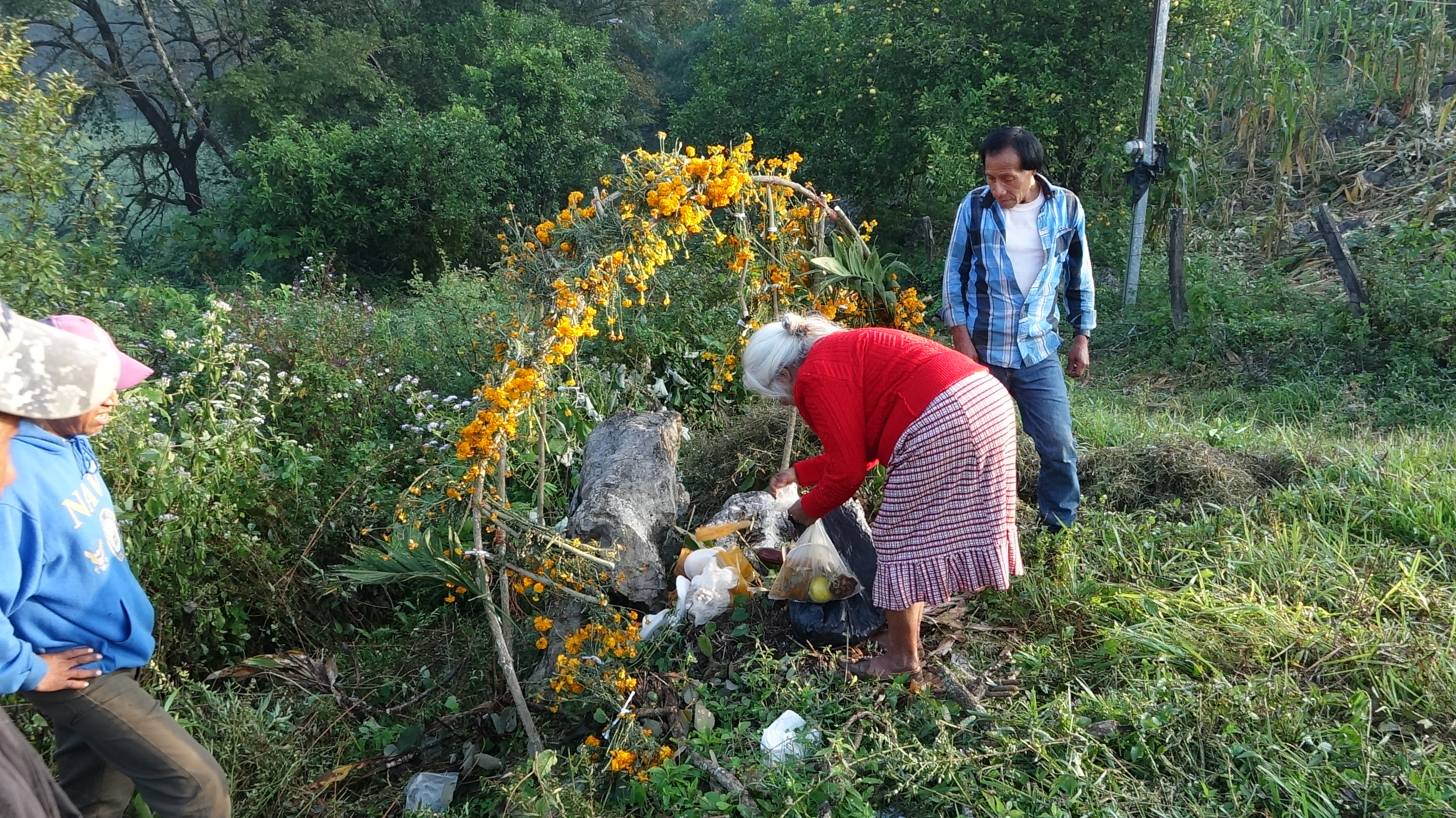 Fin de la fiesta de los muertos. Se cierra el portal el 1º. de diciembre. This photo has been taken in the country: Mexico